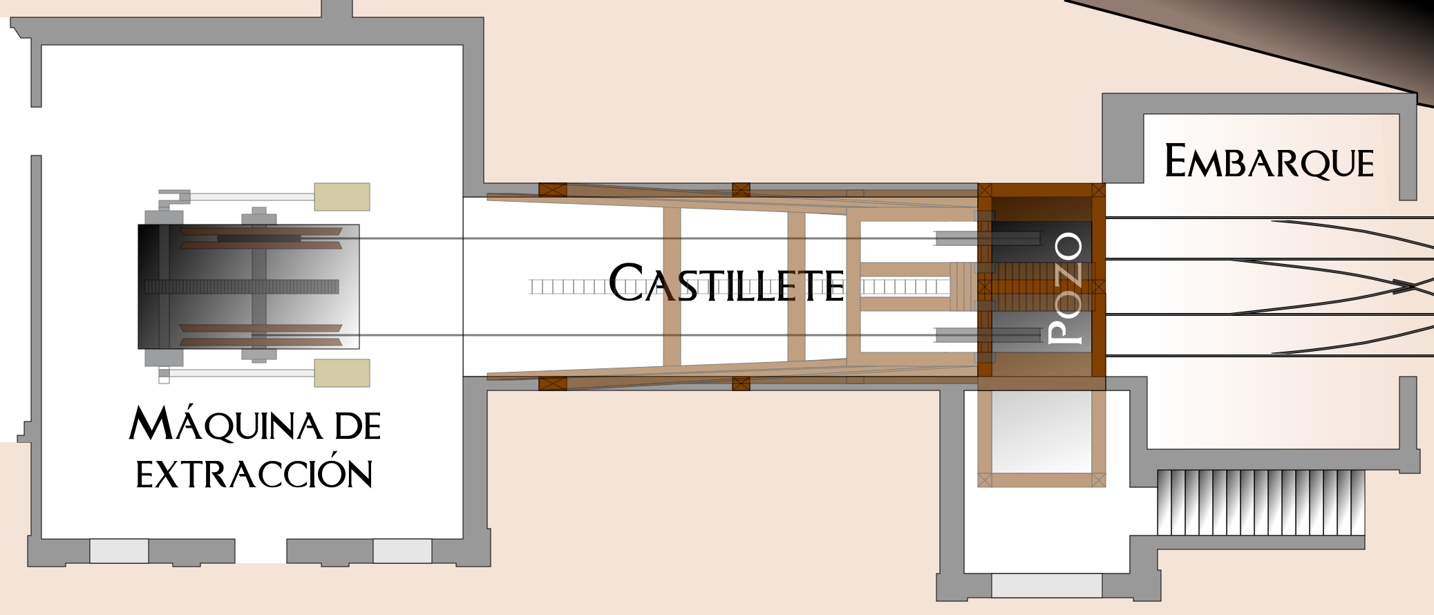 Planta del conjunto del castillete de Arnao, declarado BIC